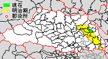 南埼玉郡の範囲 黄：明治期、緑：現在